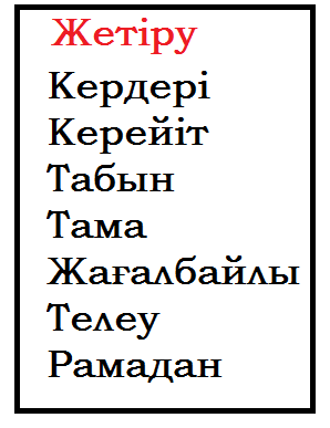 Жетіру рулары